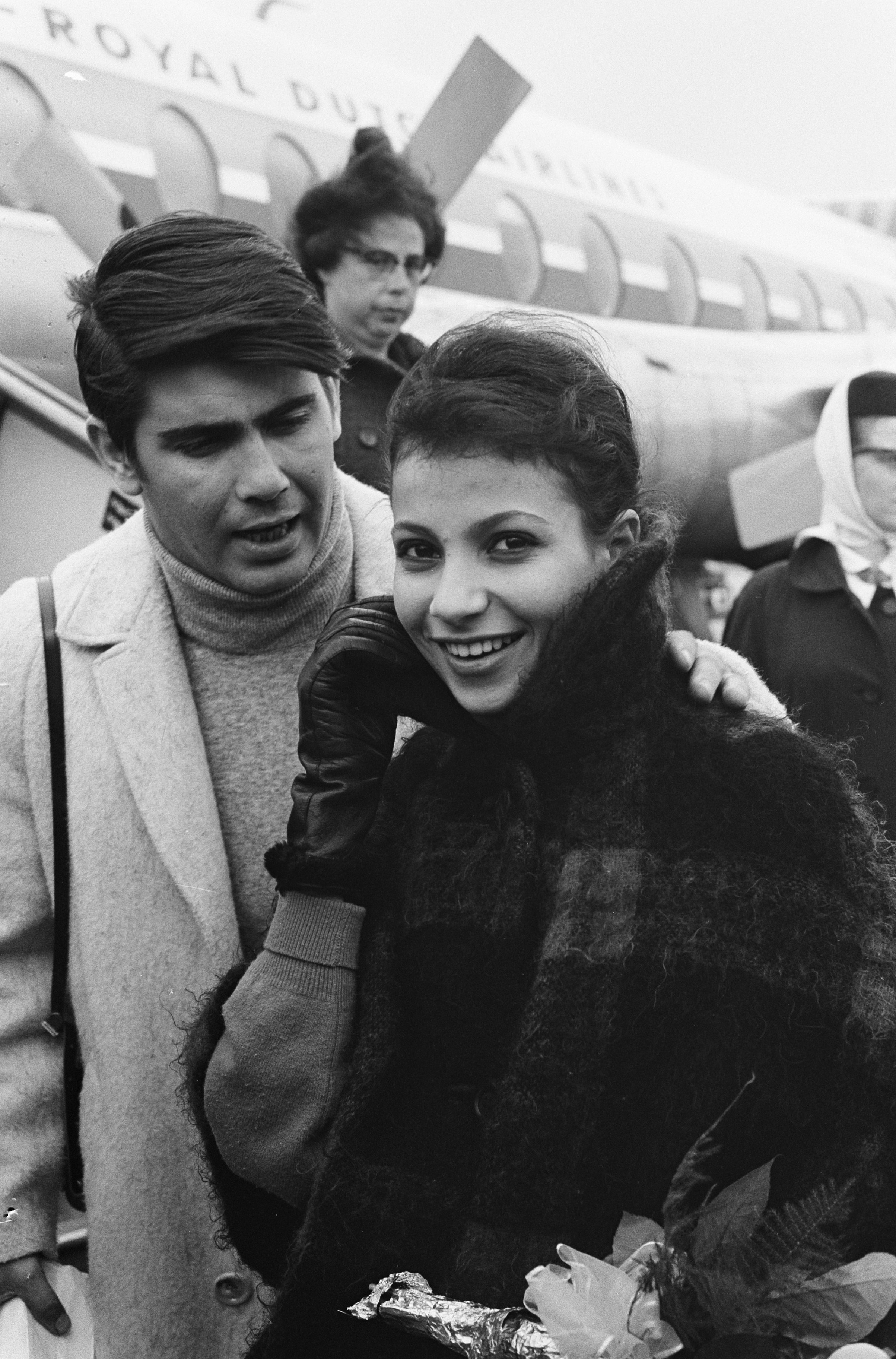 Collectie / Archief : Fotocollectie Anefo Reportage / Serie : [ onbekend ] Beschrijving : Esther Ofarim (zangeres) in Nederland voor optreden Grand Gala du Disque Datum : 10 oktober 1963 Trefwoorden : Optredens, zangeressen Persoonsnaam : Esther Ofarim Fotograaf : Pot, Harry / Anefo Auteursrechthebbende : Nationaal Archief Materiaalsoort : Negatief (zwart/wit) Nummer archiefinventaris : bekijk toegang 2.24.01.05 Bestanddeelnummer : 915-6196